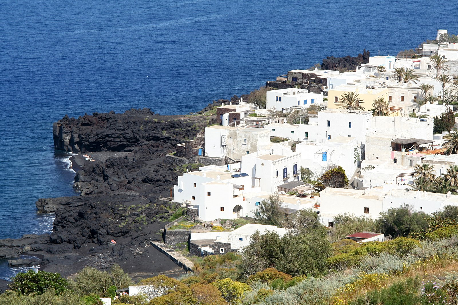 Picture 402.jpg